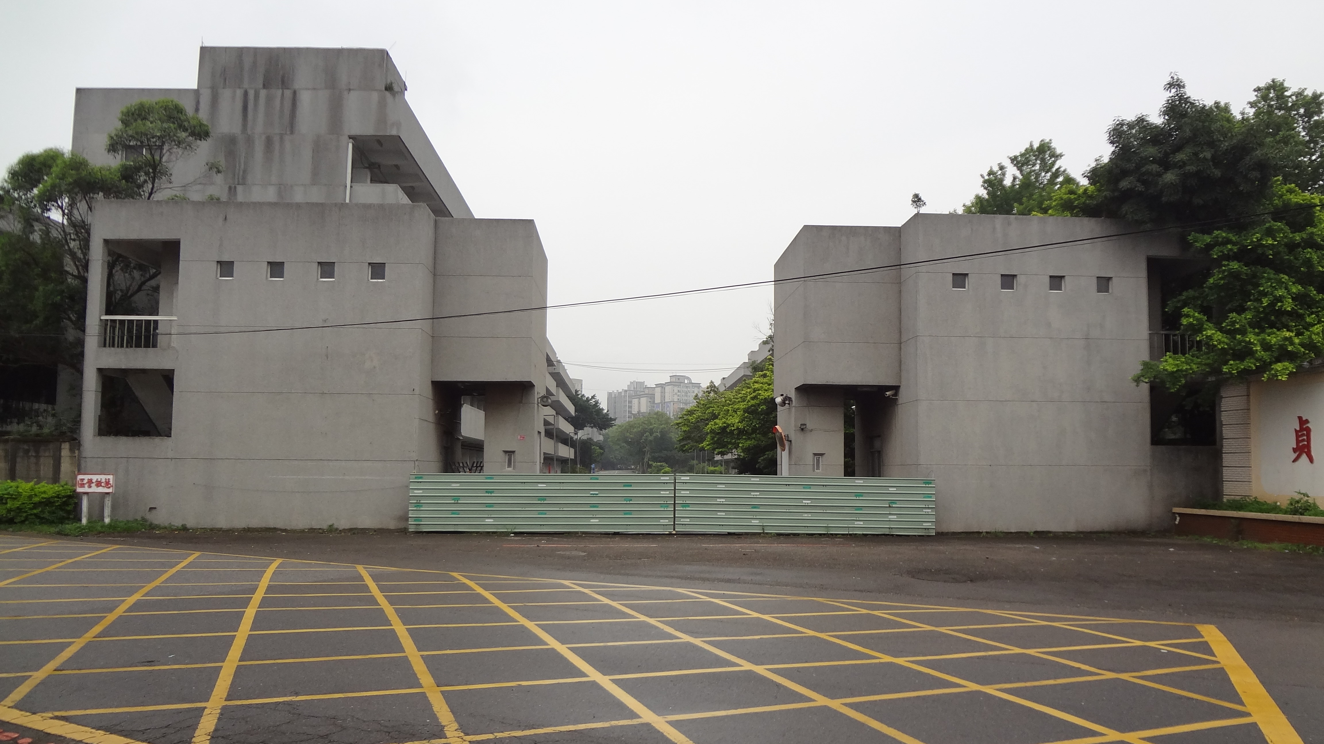 中華民國憲兵訓練中心龜山校區（慧敏營區）北大門，位於桃園市龜山區復興街，平時封閉。門牌號碼「龜山區復興街301之1號」釘掛於左方崗哨外牆。